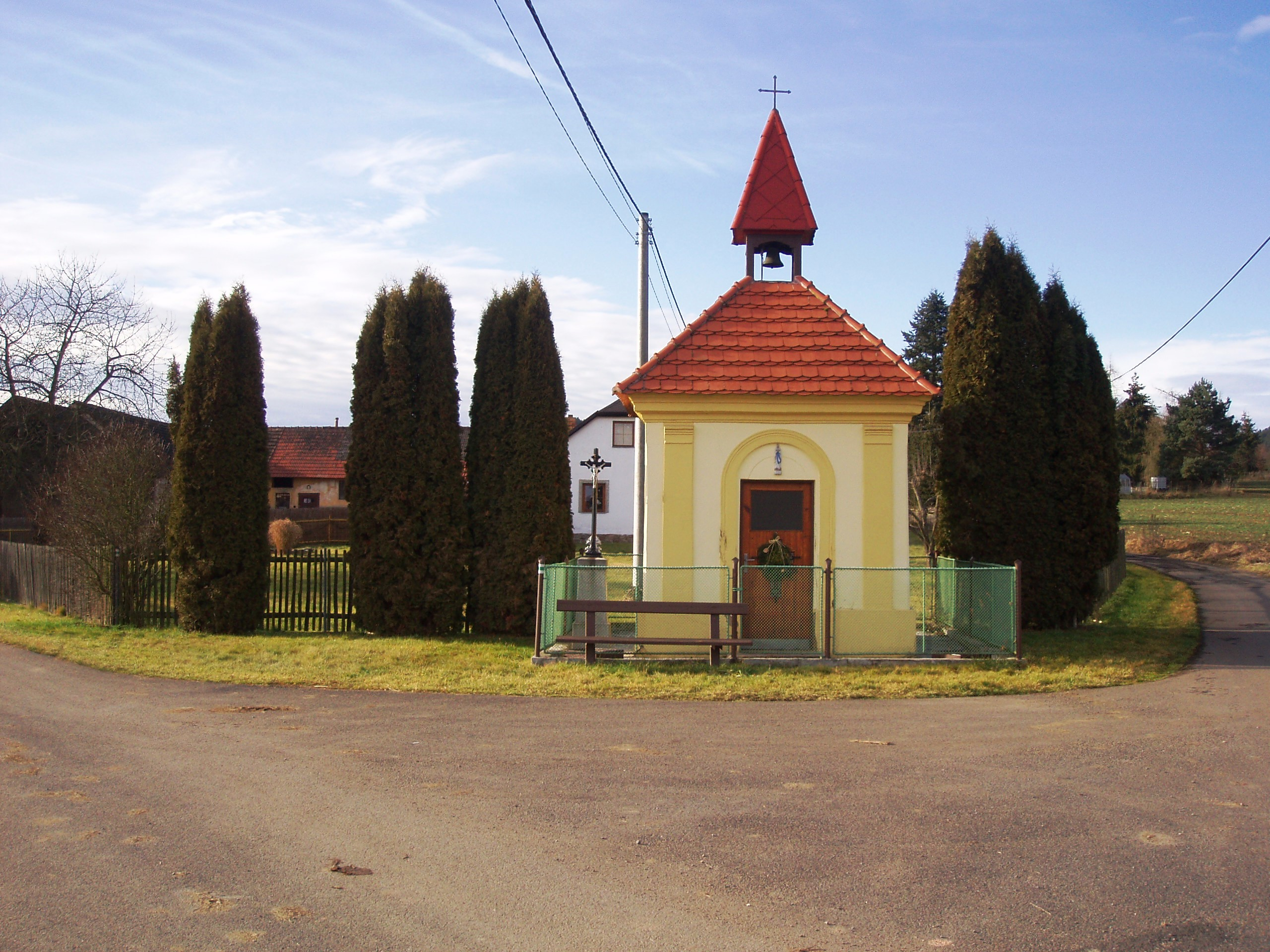 Kaple v obci Slovanská Lhota